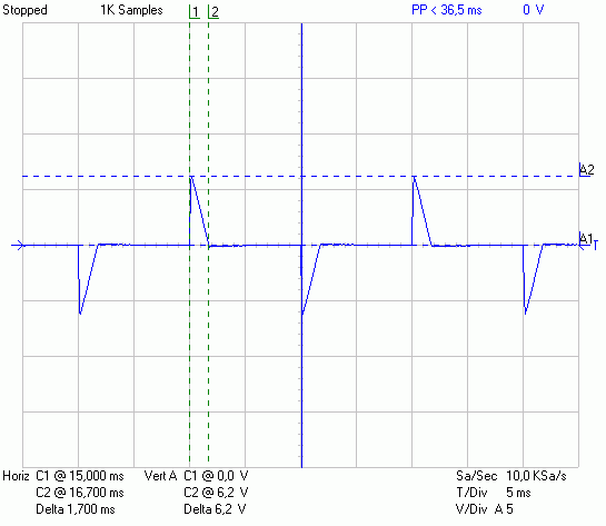 Messaufzeichung von einer Phasenanschnittssteuerung (Original text: Oszilloskopausdruck)